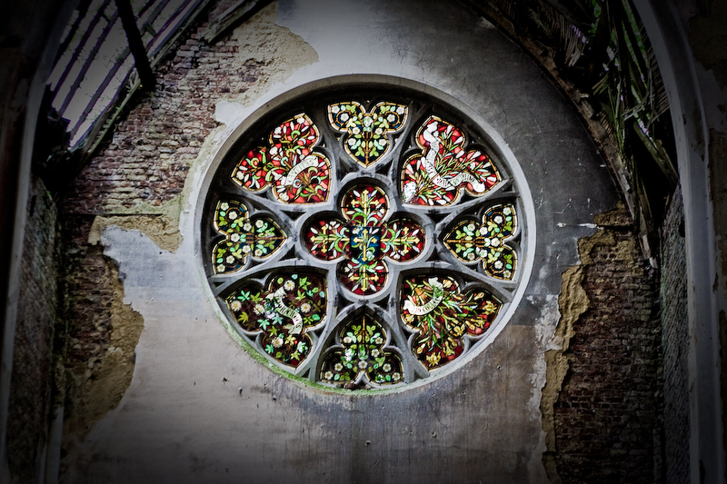 Kasteel van Mesen, Lede, Belgium (15 of 19)